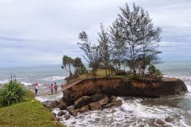 Pantai yang terletak Kecamatan Pondok Kelapa